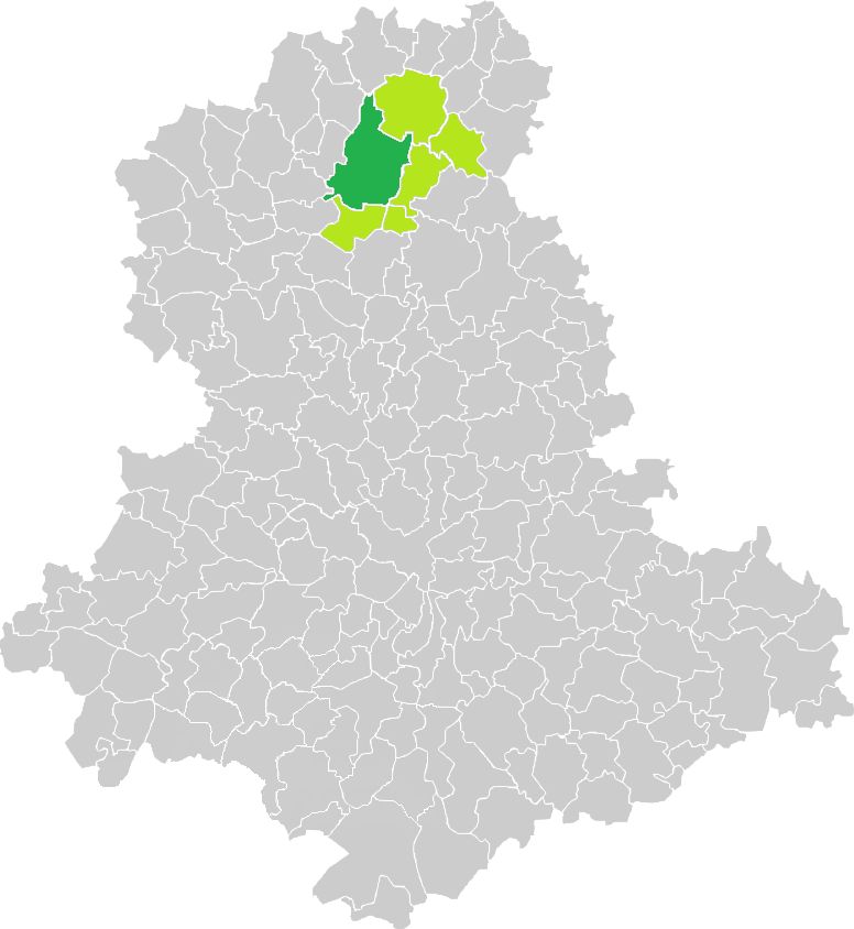 Carte de situation de la commune de Magnac-Laval (en vert foncé) dans le votre Canton (en vert clair) sur une carte des communes de la Haute-Vienne